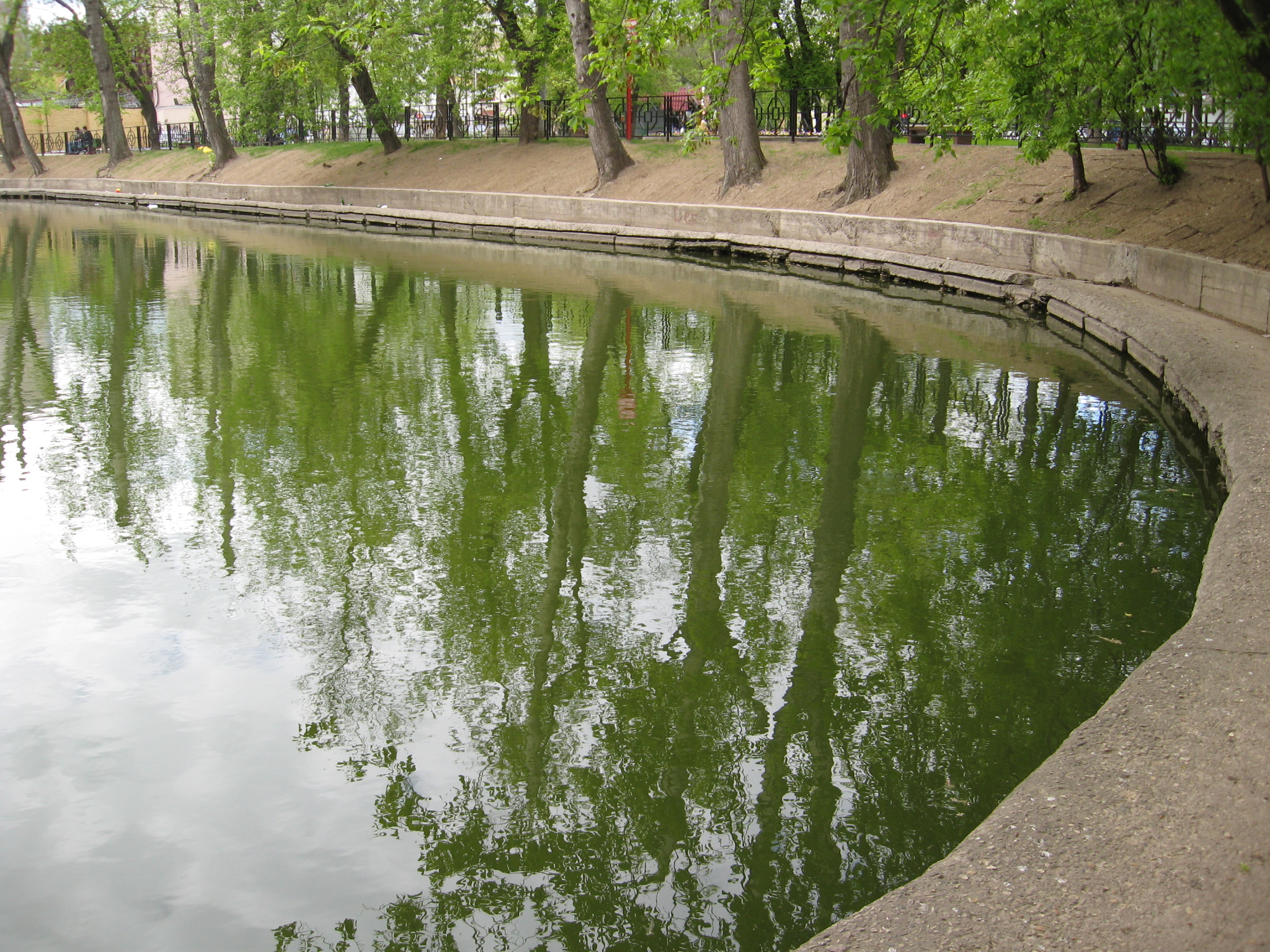 Берег вправо